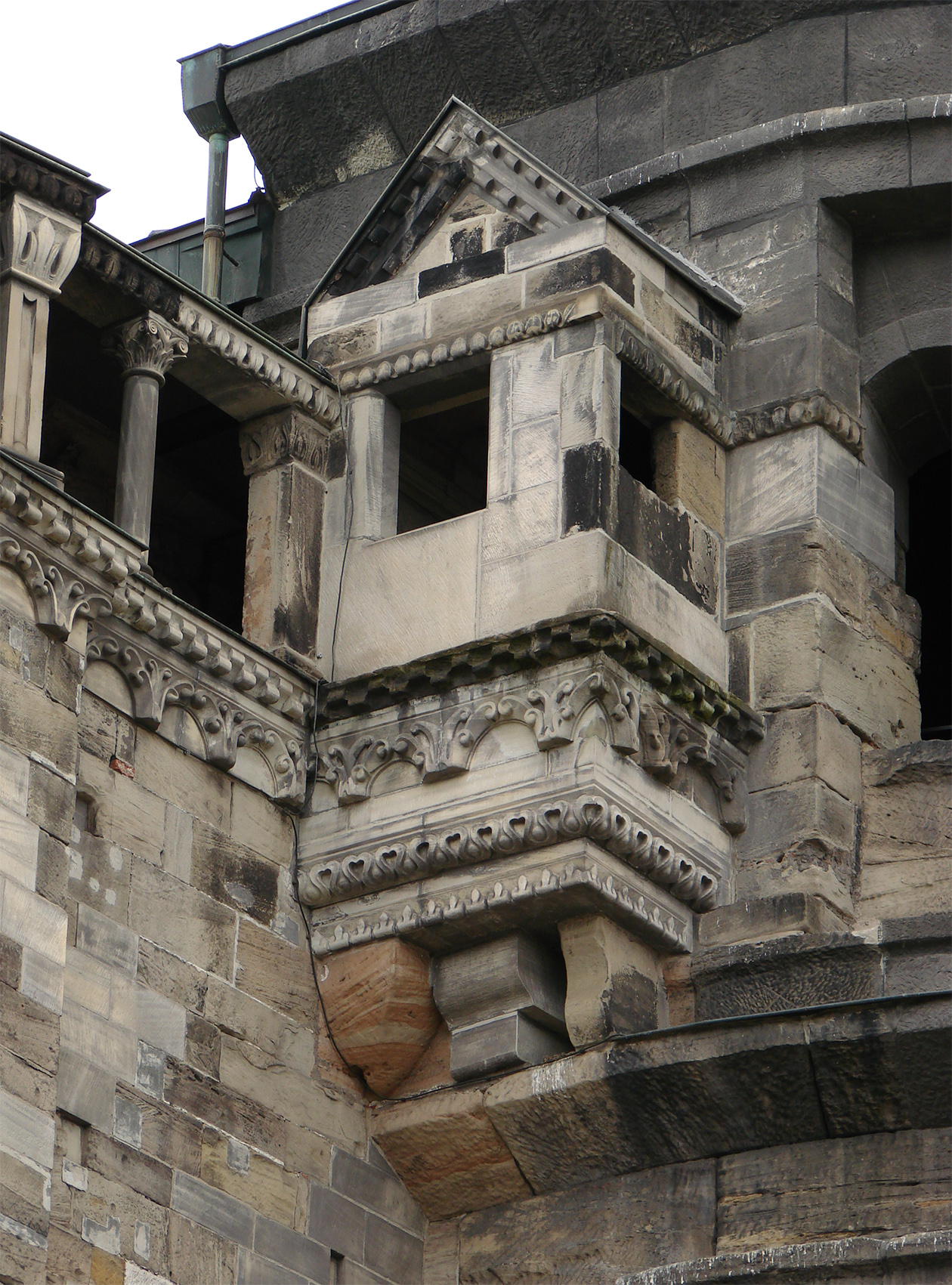 Détail de la Porta Nigra à Trèves.